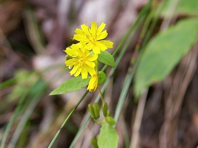 ヤクシソウ（山梨県甲州市）Youngia denticulata (Kosyu-city, Yamanashi-pref, Japan)